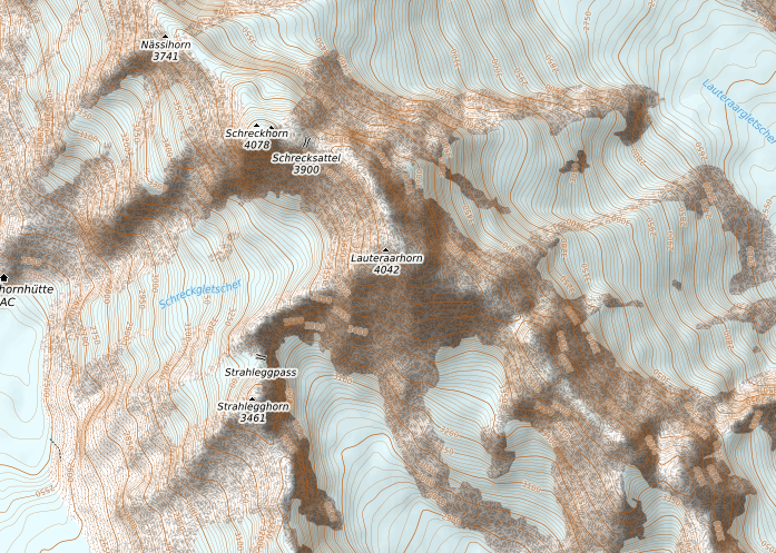 carte réalisée sur umap This map may be incomplete, and may contain errors. Don't rely solely on it for navigation.